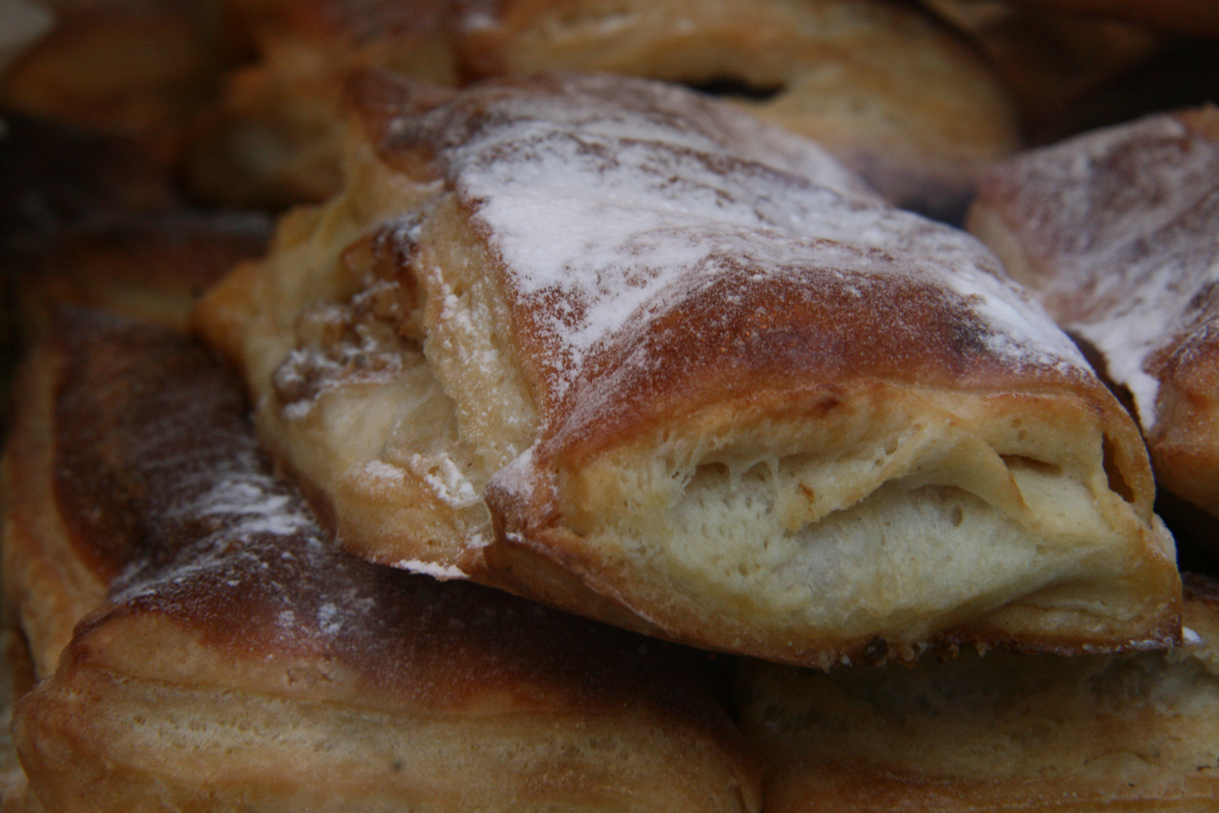 Casadiella de nuez avellana